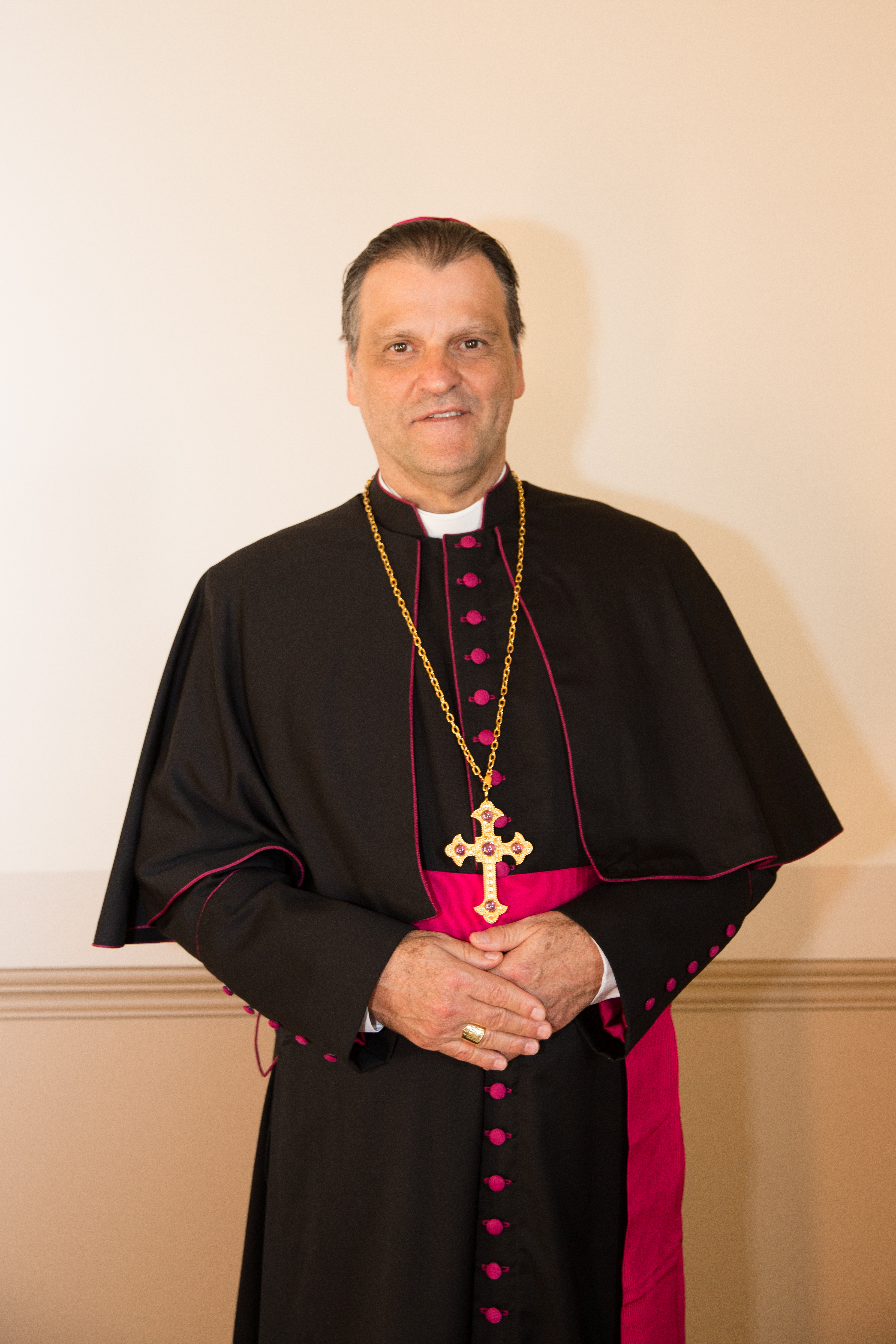 Bispo da Arquidiocese de Belo Horizonte